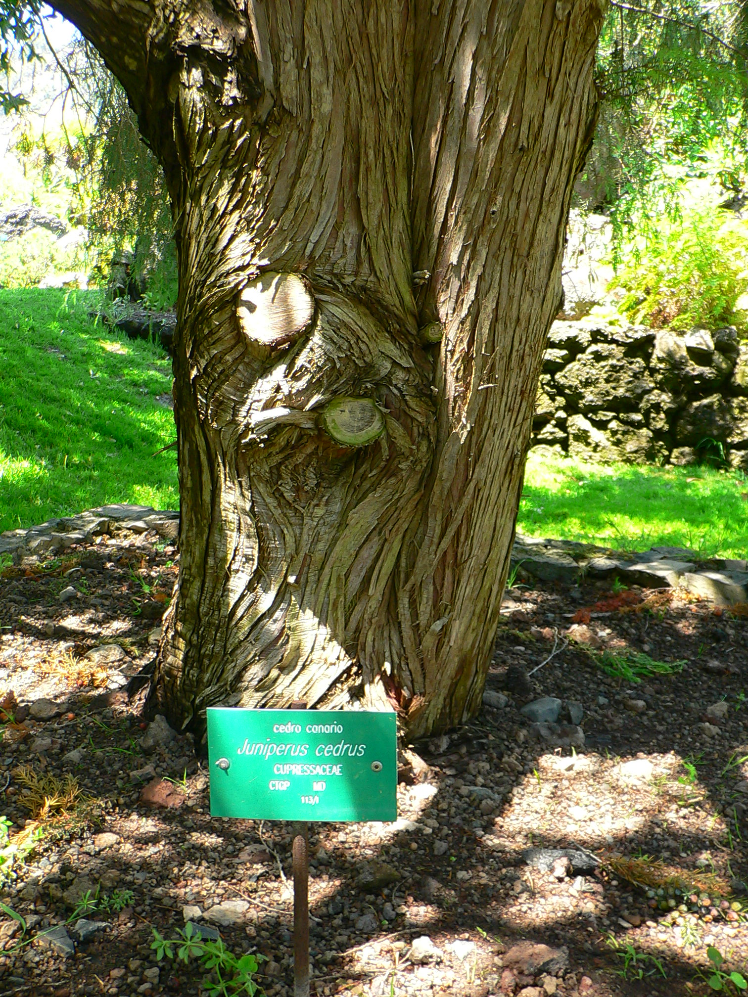 Juniperus cedrus, at the Jardin Botánico Viera y Clavijo, Gran Canaria